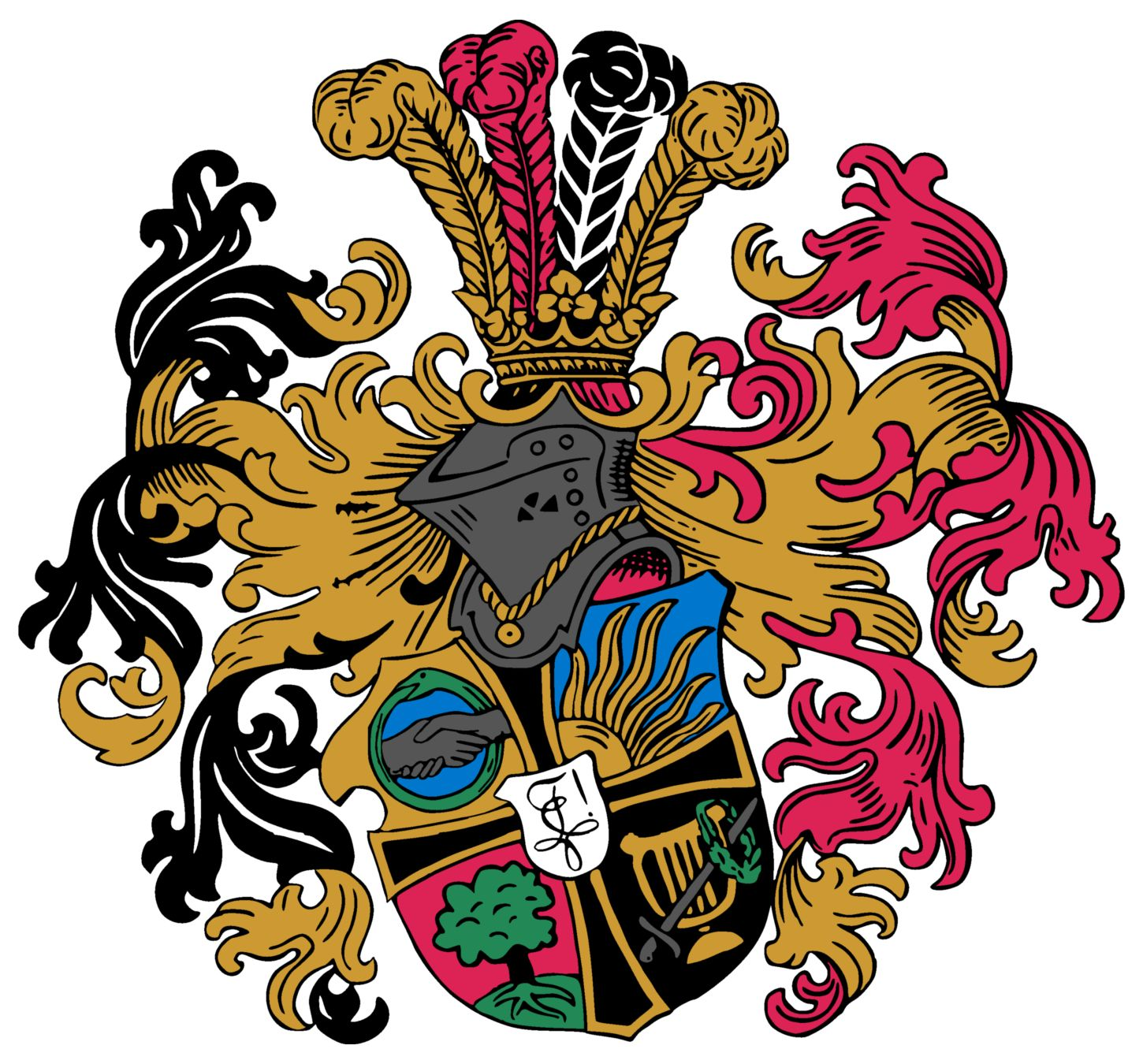 Dies ist das Wappen der Urburschenschaft, das 1815 entworfen wurde. Vgl. Wikipedia:Wappen: "Bei Traditionswappen, die seit Jahrhunderten mehr oder minder unverändert geführt werden, scheidet ein Urheberrechtsschutz aus, da man davon ausgehen kann, dass der ursprüngliche Schöpfer mehr als 70 Jahre tot ist (Schutz im deutschen und europäischen Recht 70 Jahre pma)."